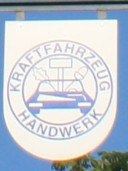 Walldorf, Baden-Württemberg: Wappenbaum an der Hauptstraße: Innungswappen der KFZ-Handwerk